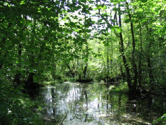 Foto door gebruiker zelf gemaakt.